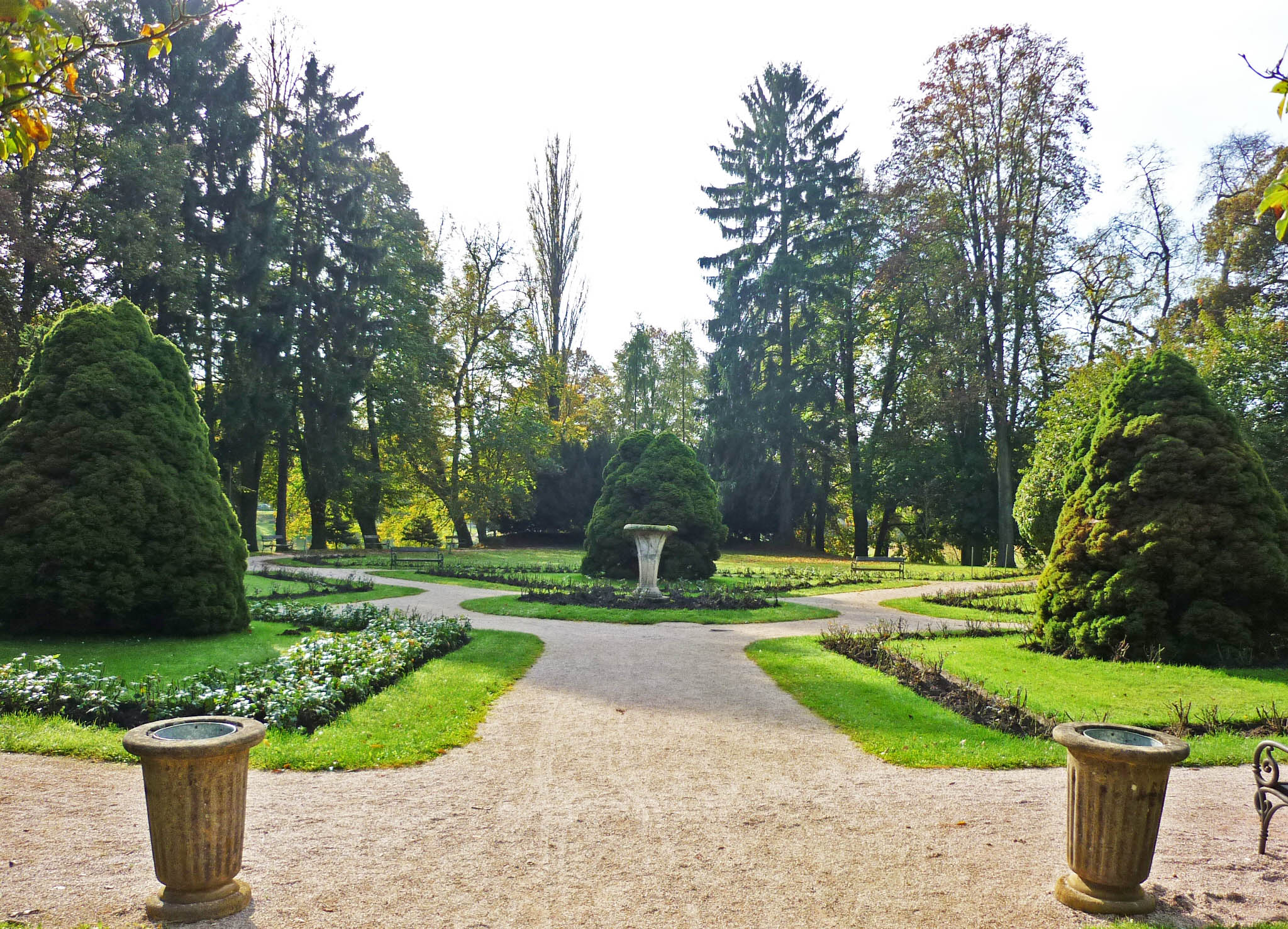 Jirasek-Park in Königgrätz (Hradec Králové)